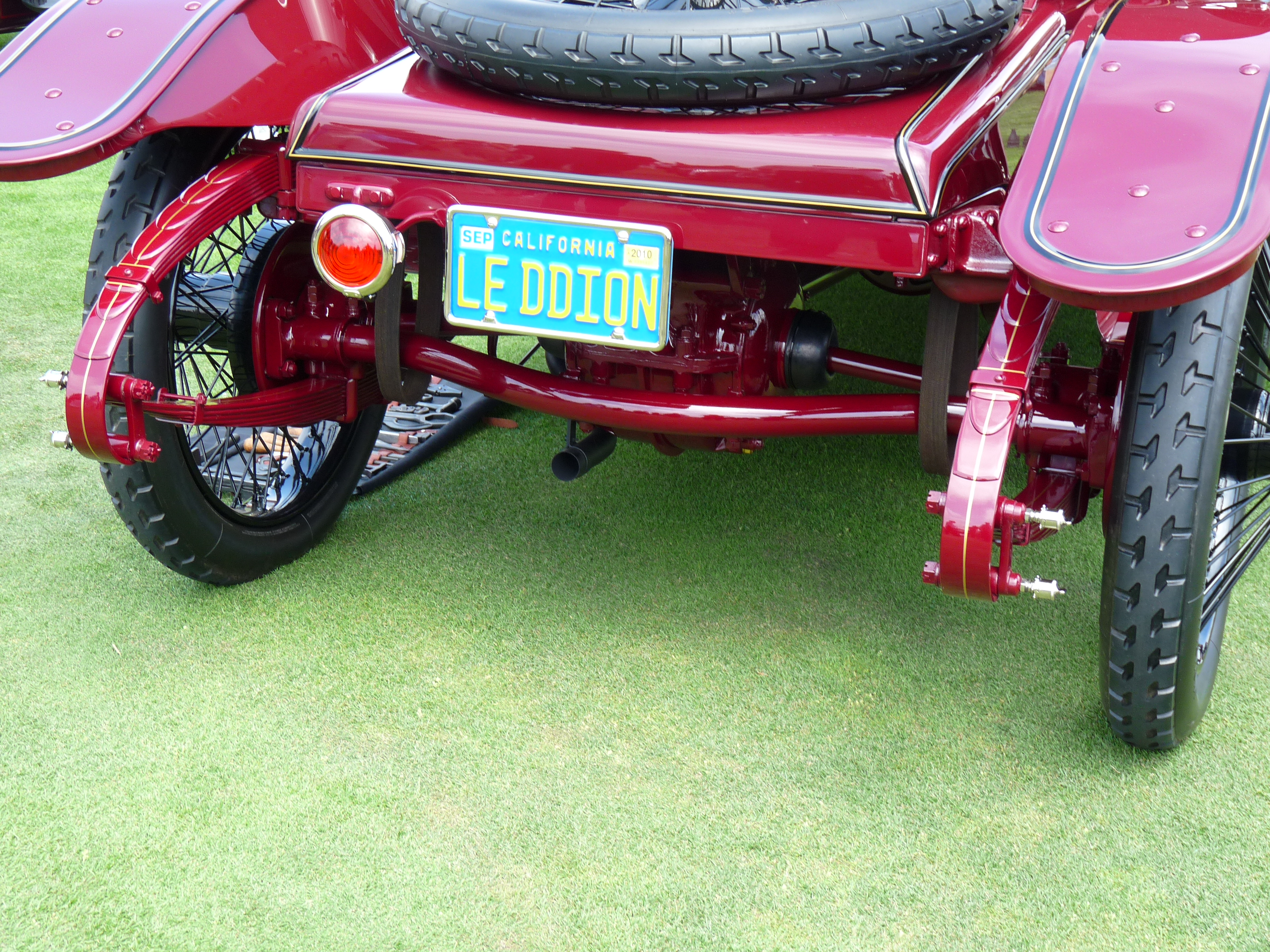 1912 De Dion Bouton DM A.S. Flandrau Roadster